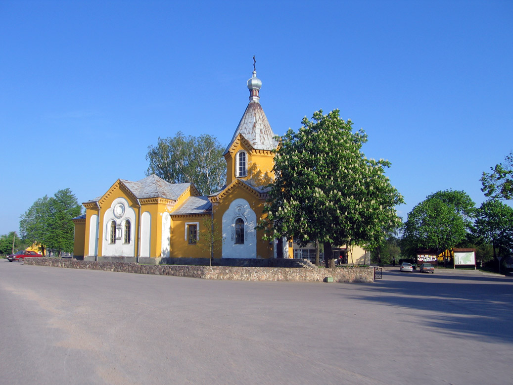 Merkine Orthodox Church